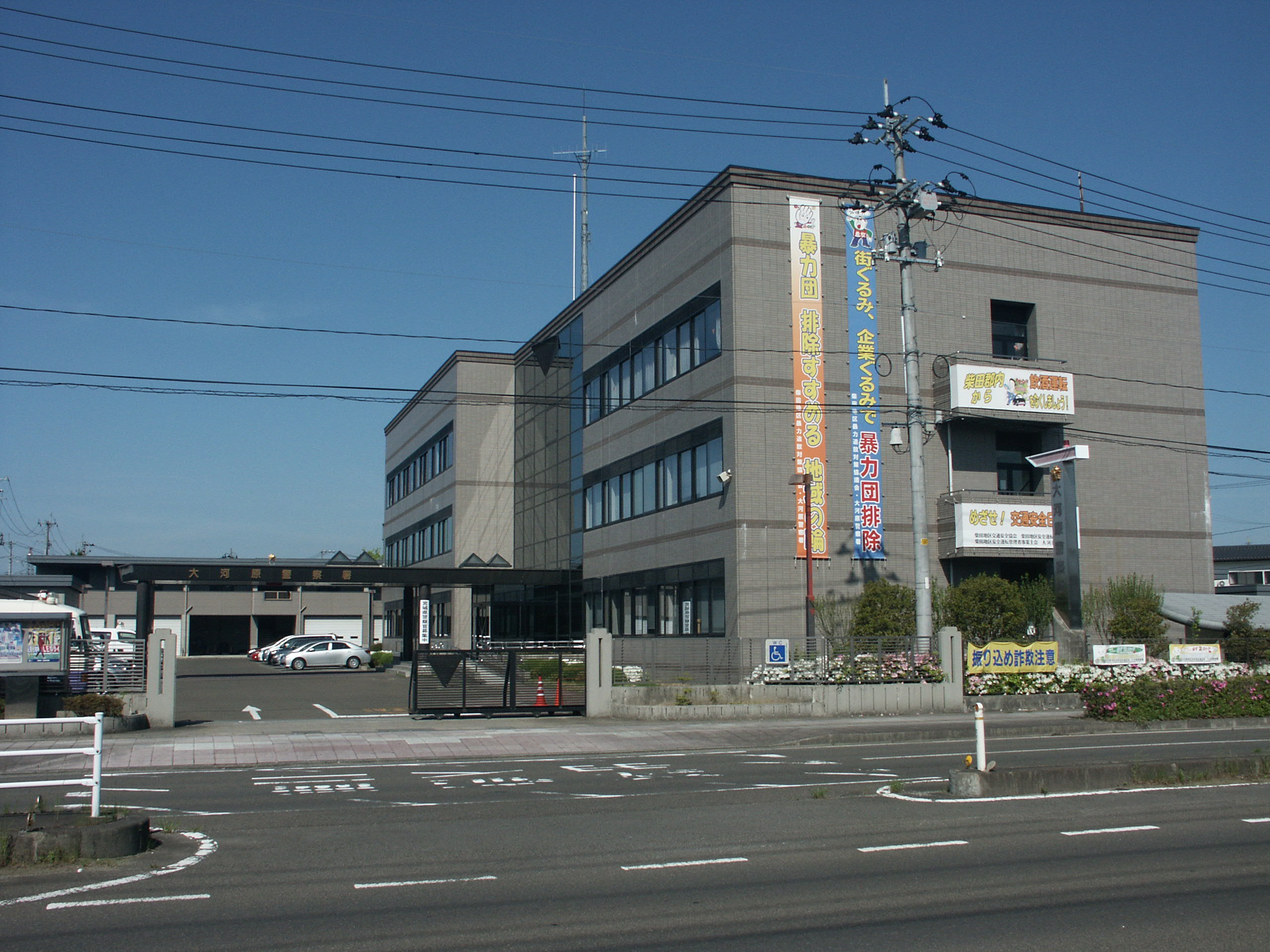 宮城県大河原警察署庁舎